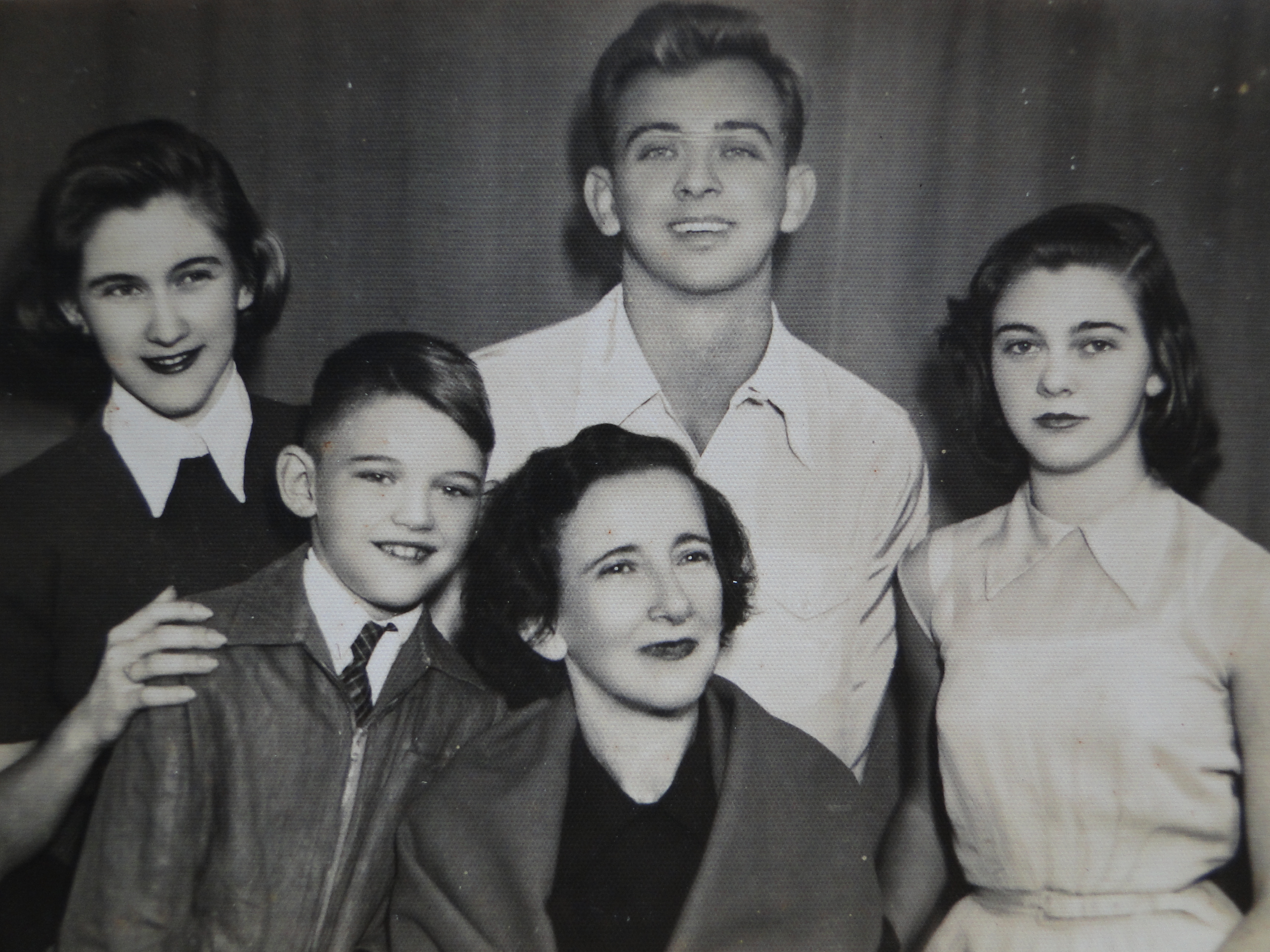 O artista plástico Carlos Haraldo Sörensen (acima ao centro) e sua família. Data: 1951 Local: Rio de Janeiro